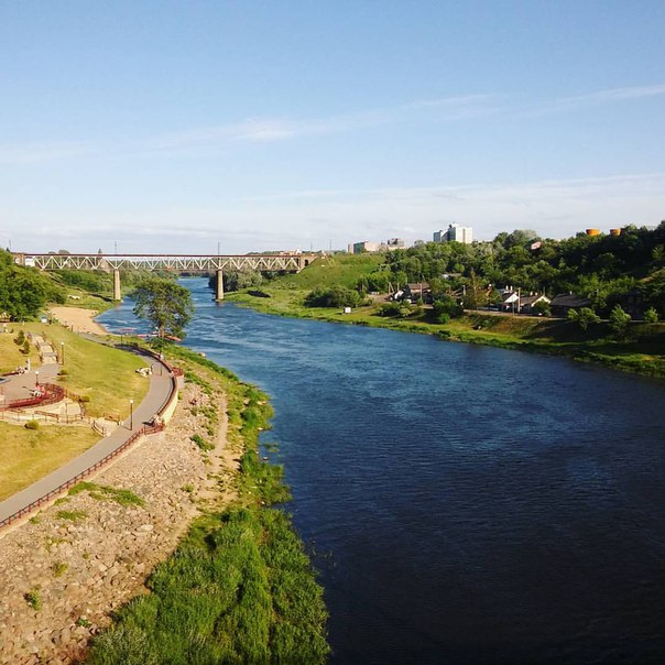 Вид на Неман со Старого моста